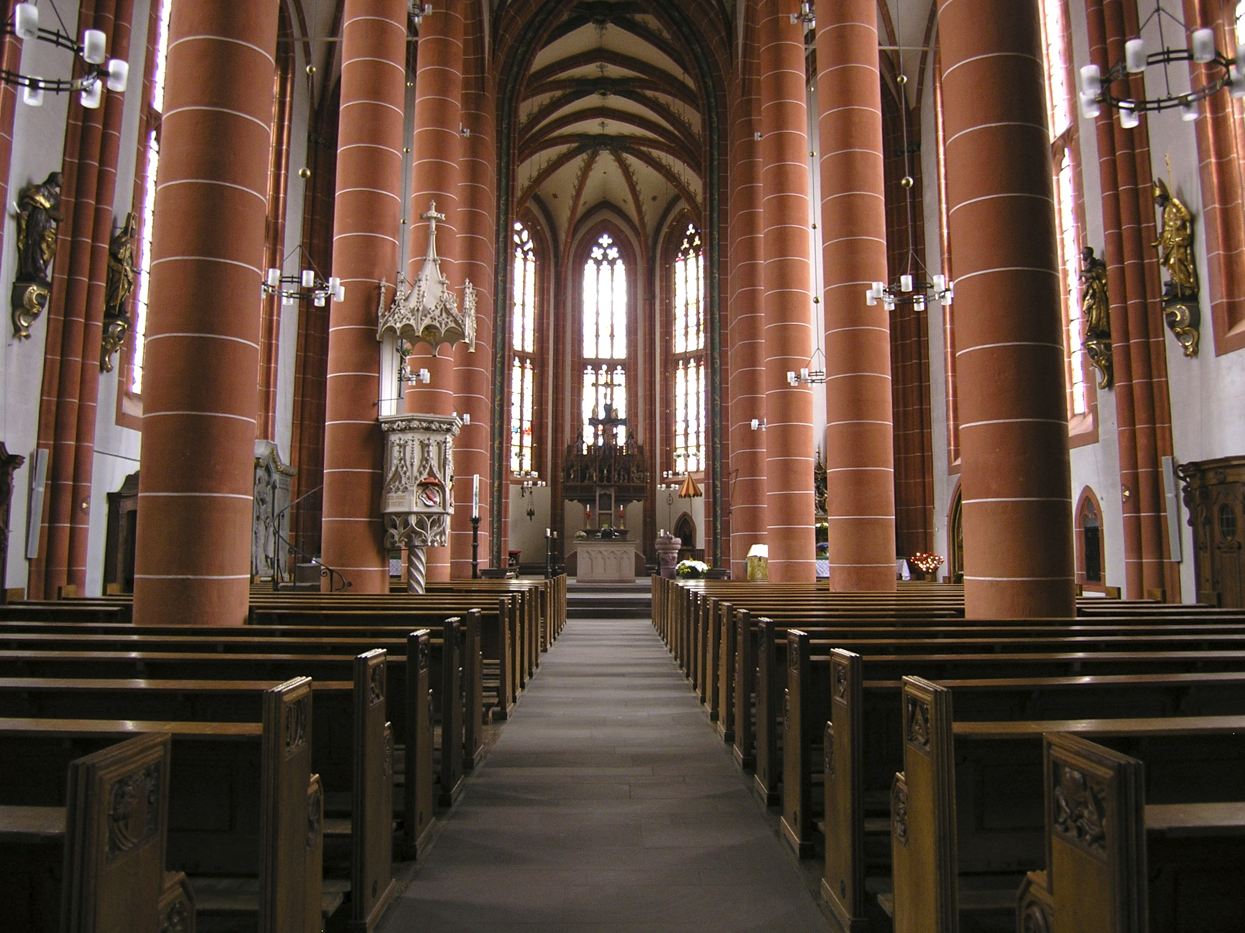 Innenraum der Wendalinusbasilika St. Wendel; Blick vom Mittelschiff zum Chorraum.